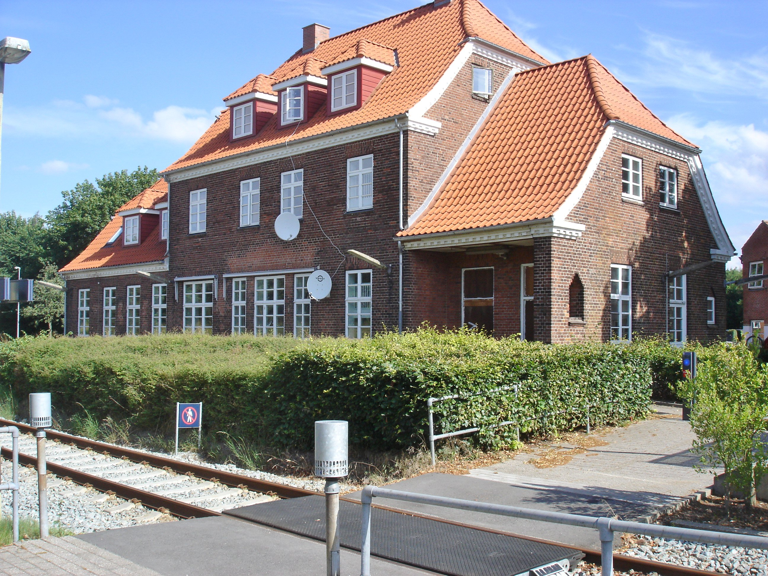 Rødkærsbro Station fra sporside